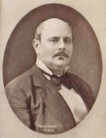 Portrait photographique de Xavier de Montépin par [Alexandre] Ernest Ladrey.